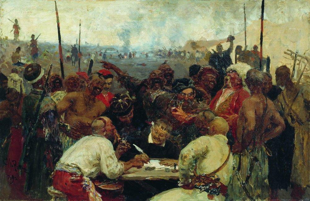 Sketch